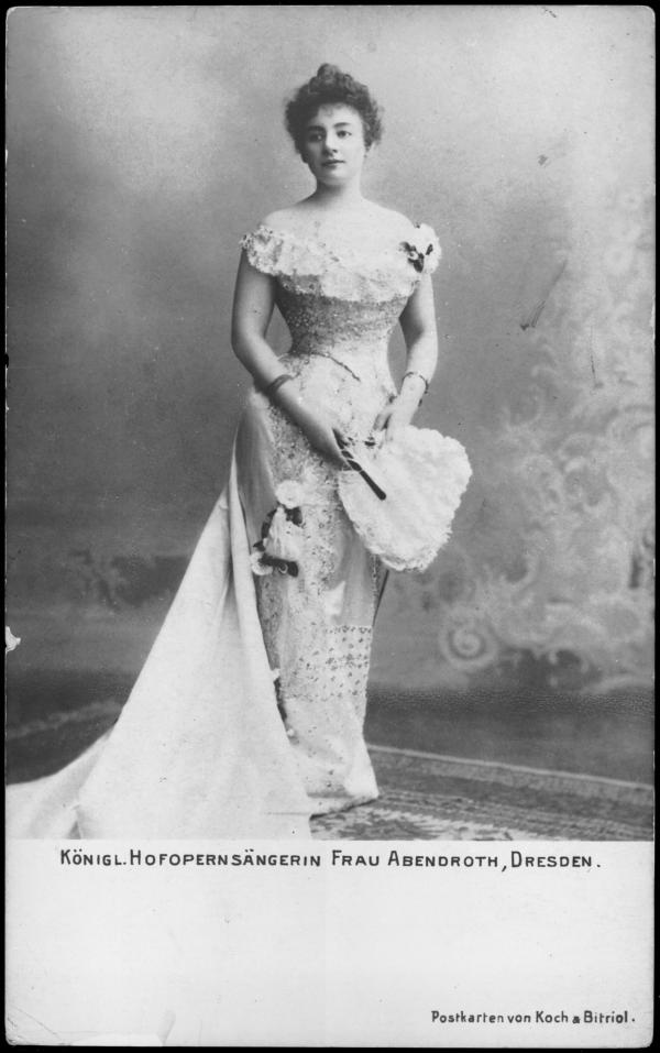 Irene Abendroth (1872-1932) war eine österreichische Sängerin